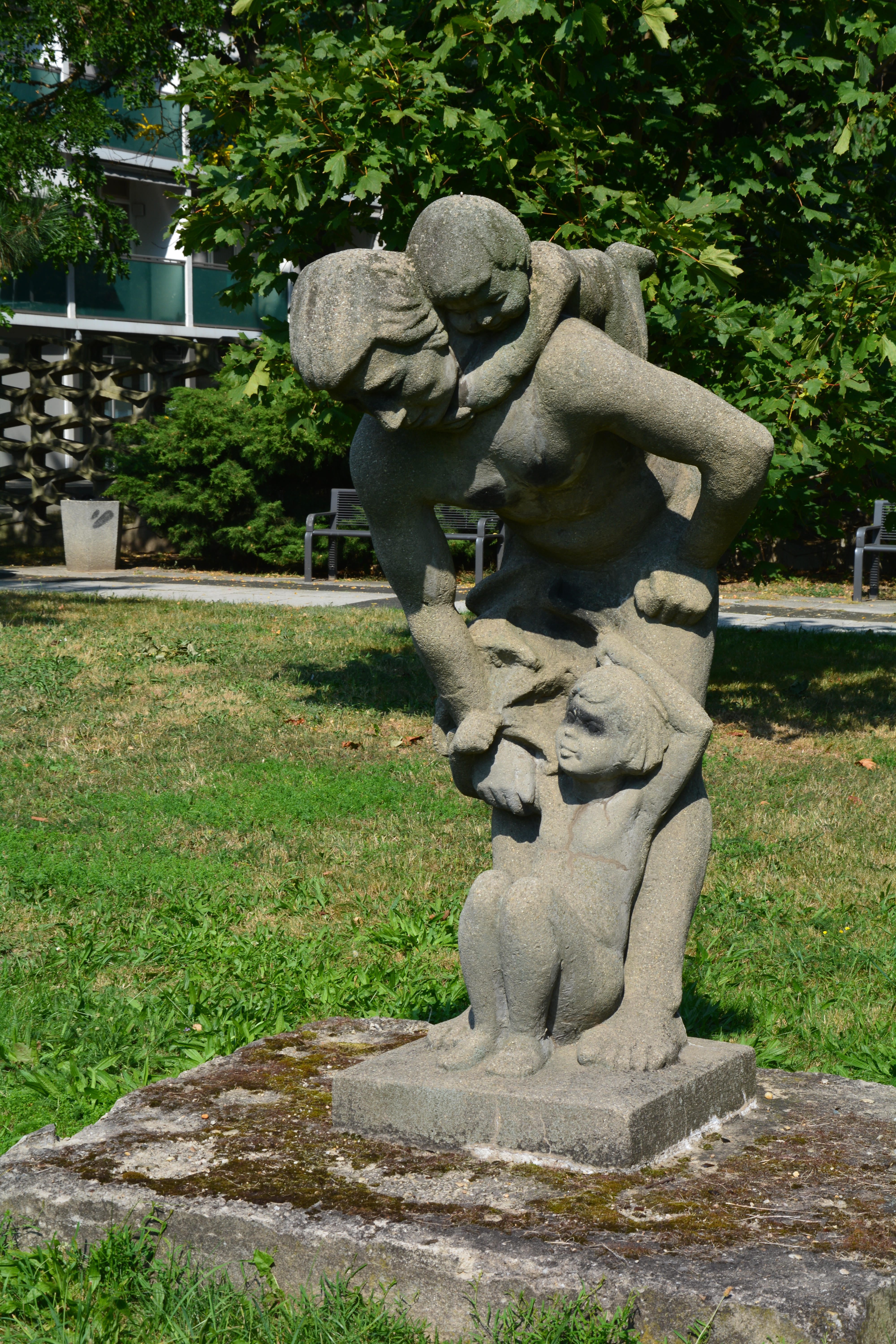 Dresden, Sidonienstraße, Figur Vater und Kinder vom Dresdner Bildhauer Karl Schönherr.